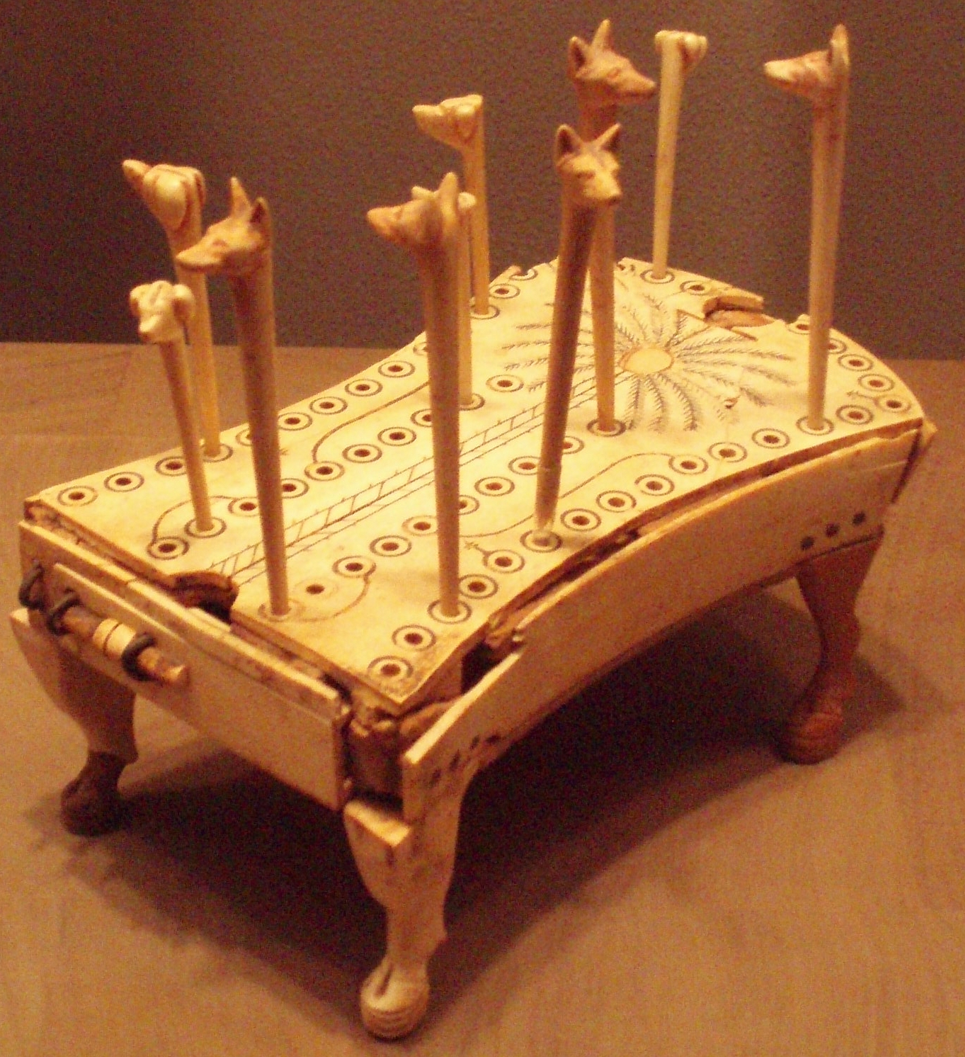 Fundort Grab des Reniseb (Regierungszeit Amenemhet IV.), heute Metropolitan Museum of Art, New York, Schenkung von S. Harkness, Inventar-Nr. 26.7.1287